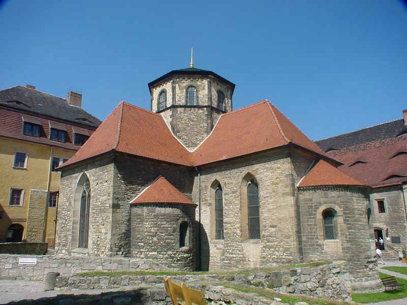 eigenes Foto von 2004, Burgkirche, public domain